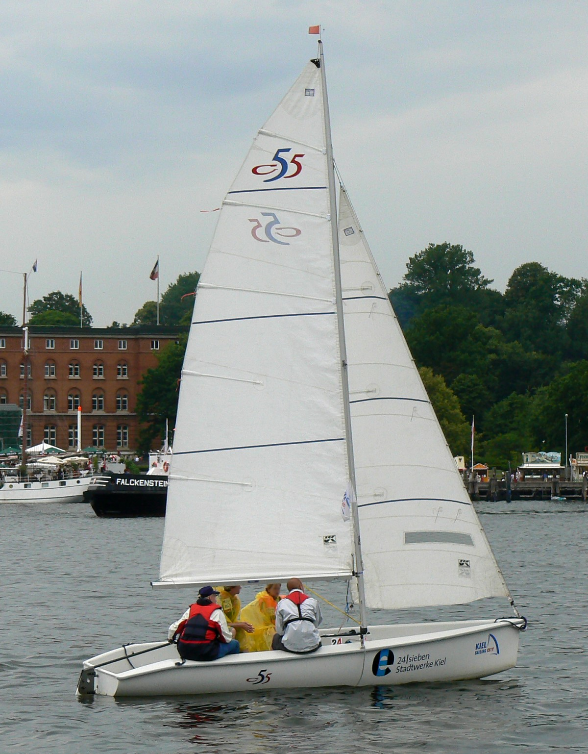 Segelboot der Bootsklasse c55 auf der Kieler Förde.